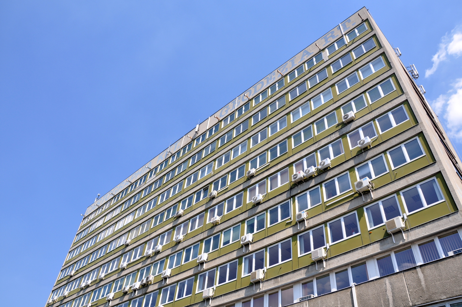 Cartographia Hungary HQ